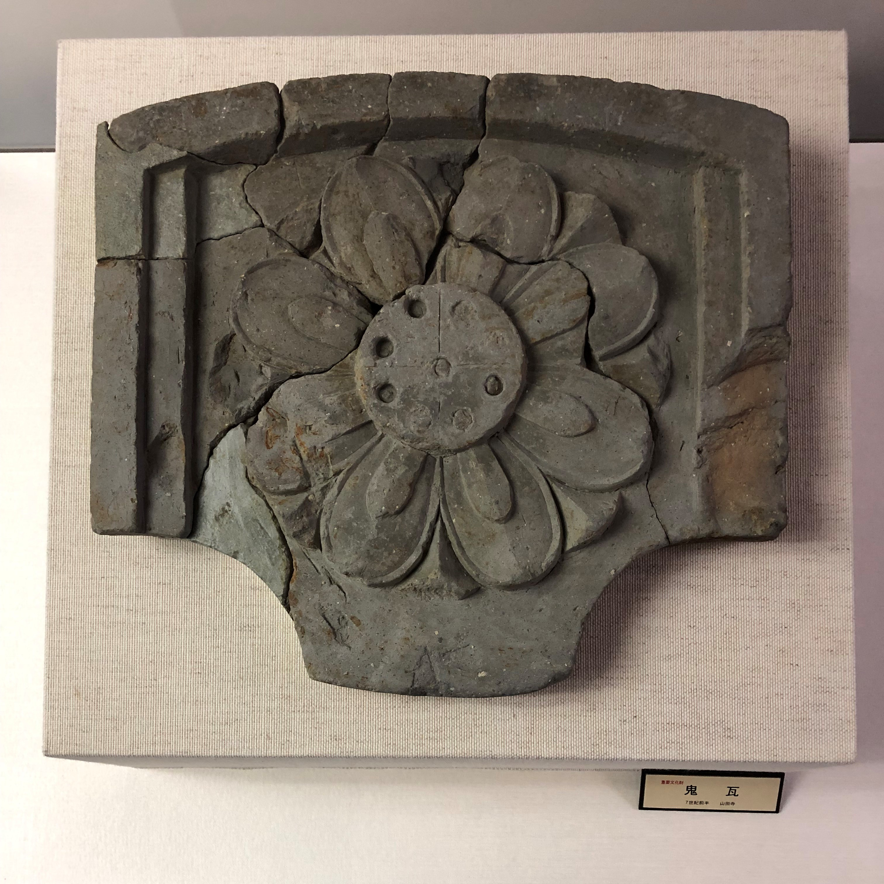 山田寺の鬼瓦 (飛鳥資料館展示)